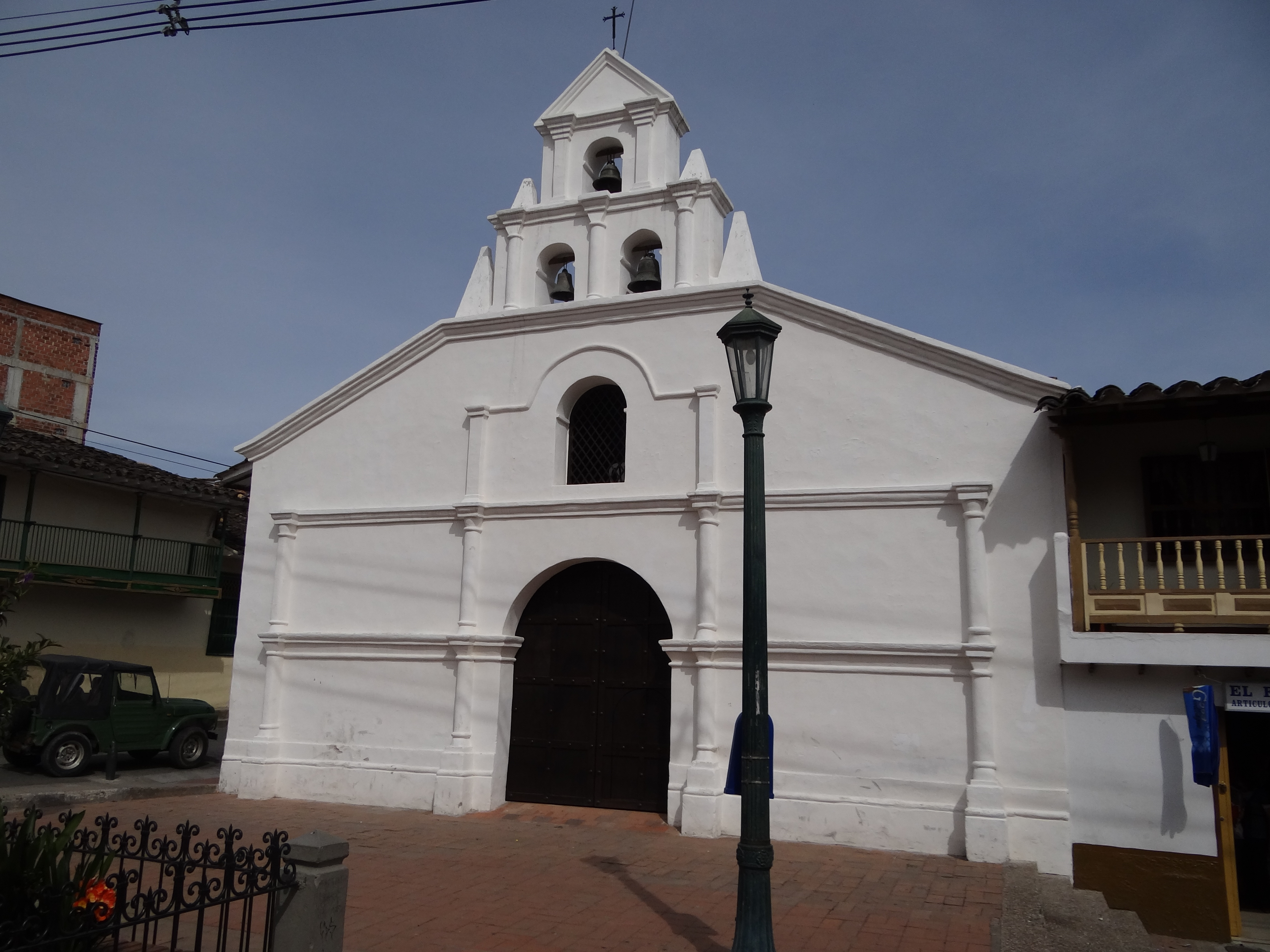 Sector Antiguo de Marinilla